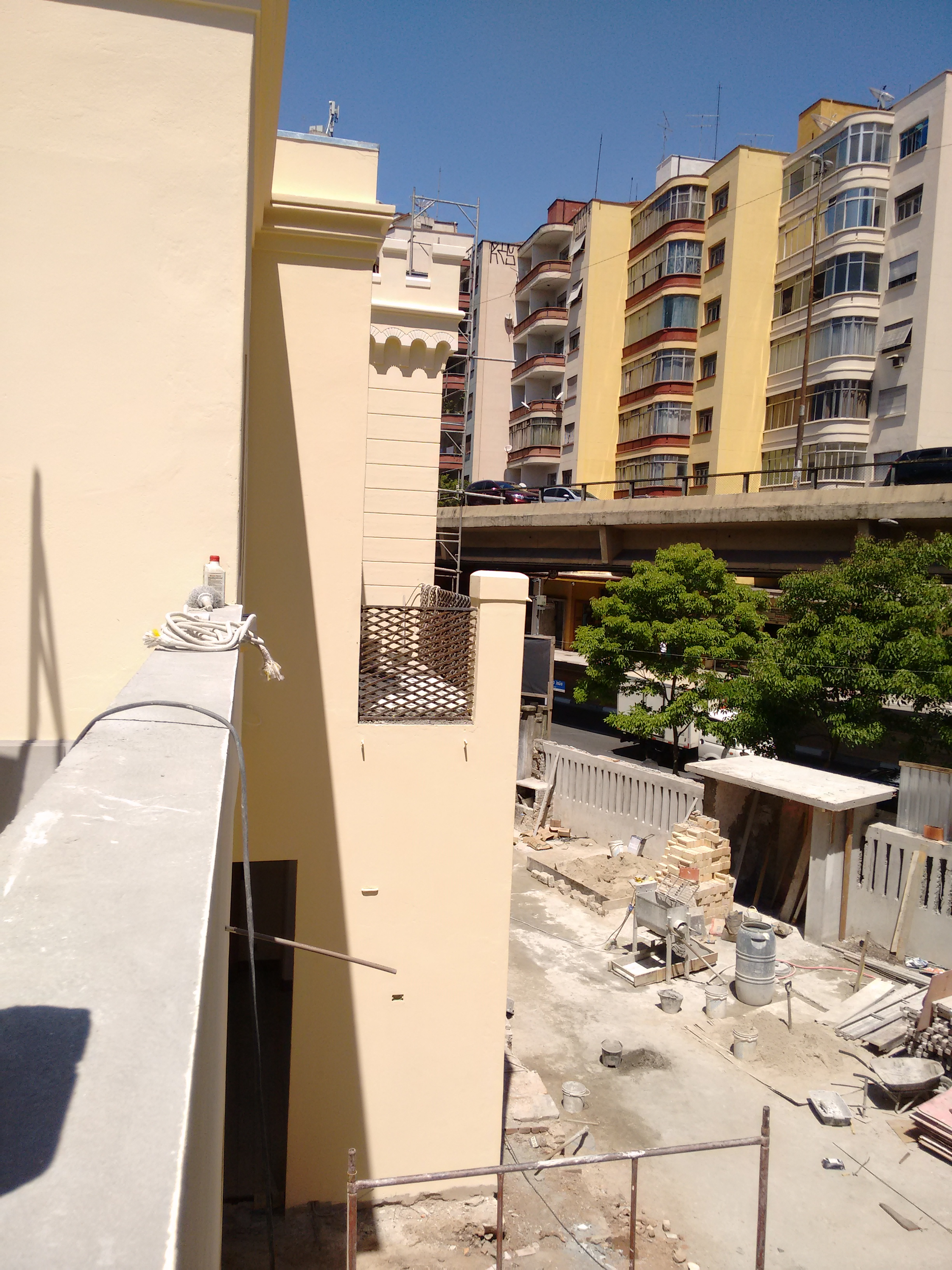 Vista da sacada posterior do Castelinho da Rua Apa em processo de restauro, São Paulo (SP), Brasil.